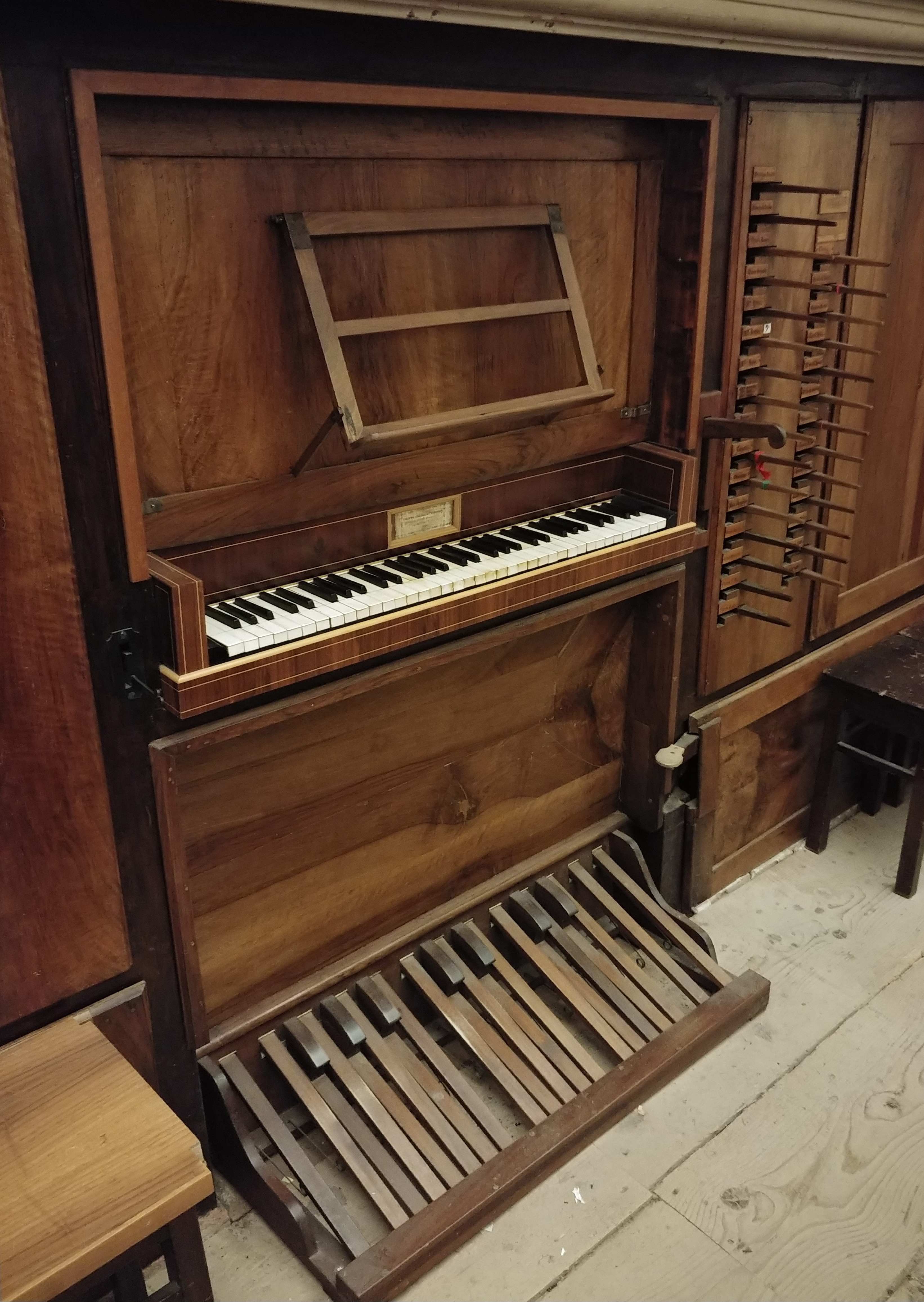 Consolle.